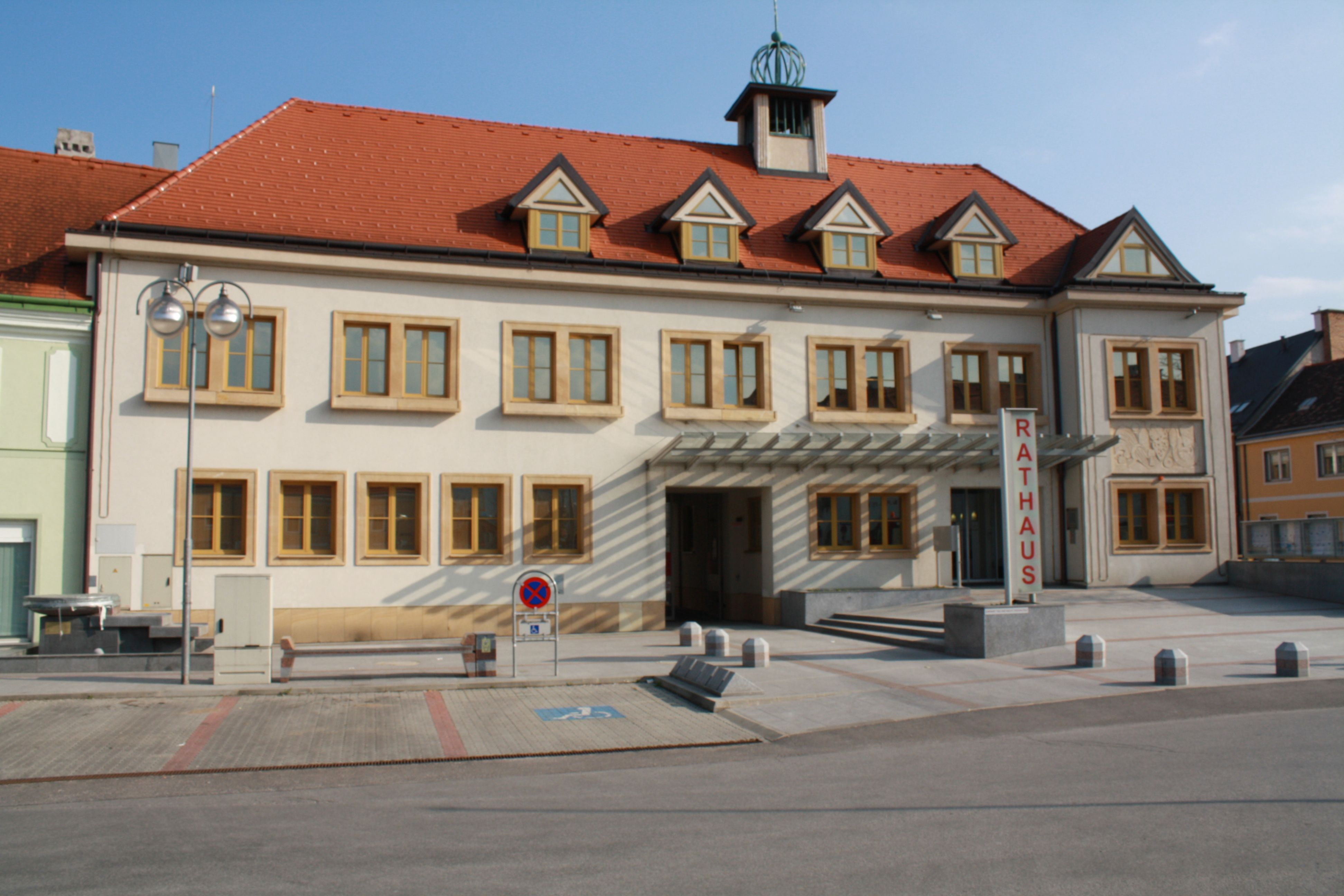 Rathaus Traiskirchen